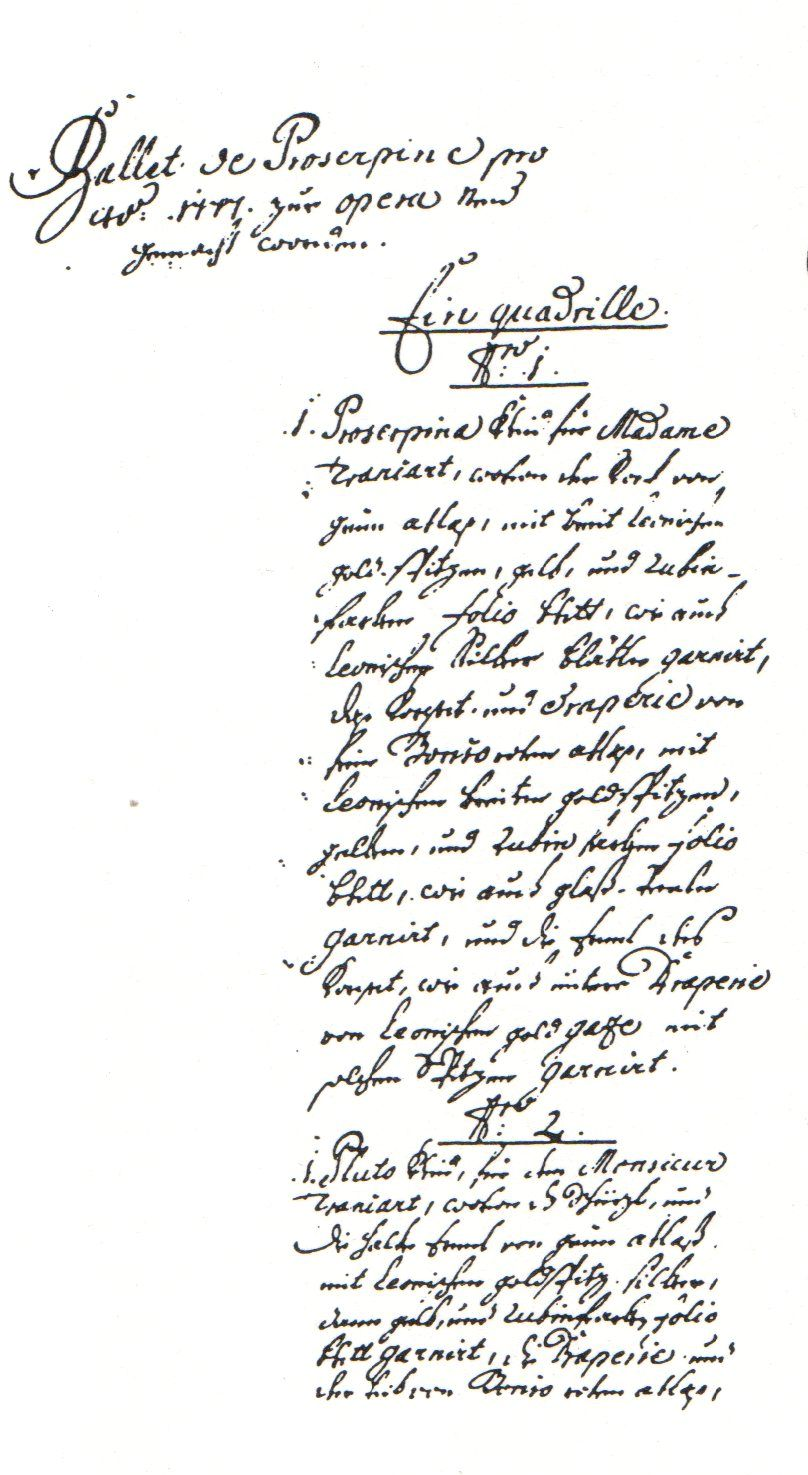 Beschreibung des Proserpina-Kostüms für Maria Anna Trancart in einem Inventarium des Münchner Balletts von 1777